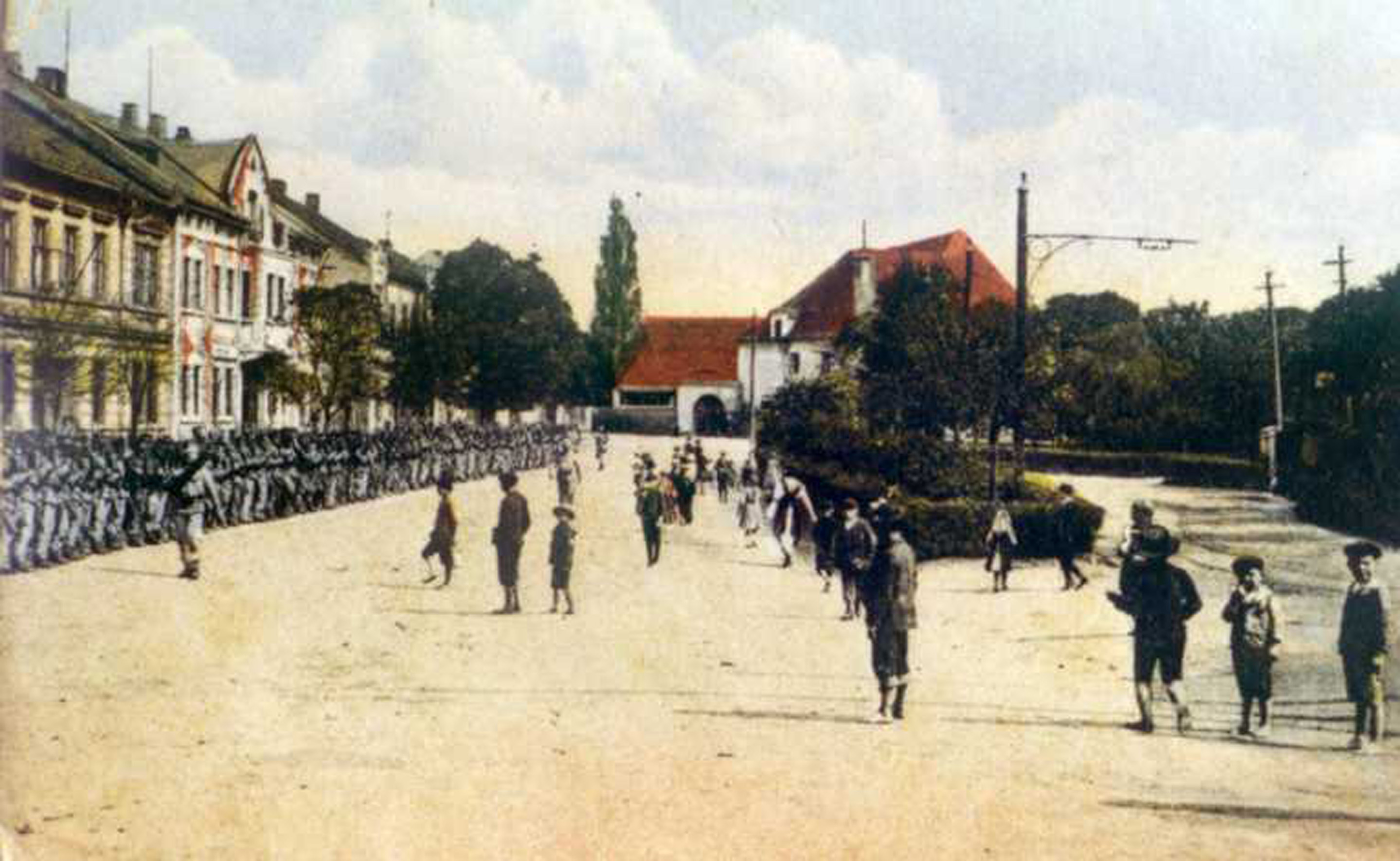 Ehemalige Gemeinde Kopisty (Kopitz) bei Most (Brüx) in Tschechien.